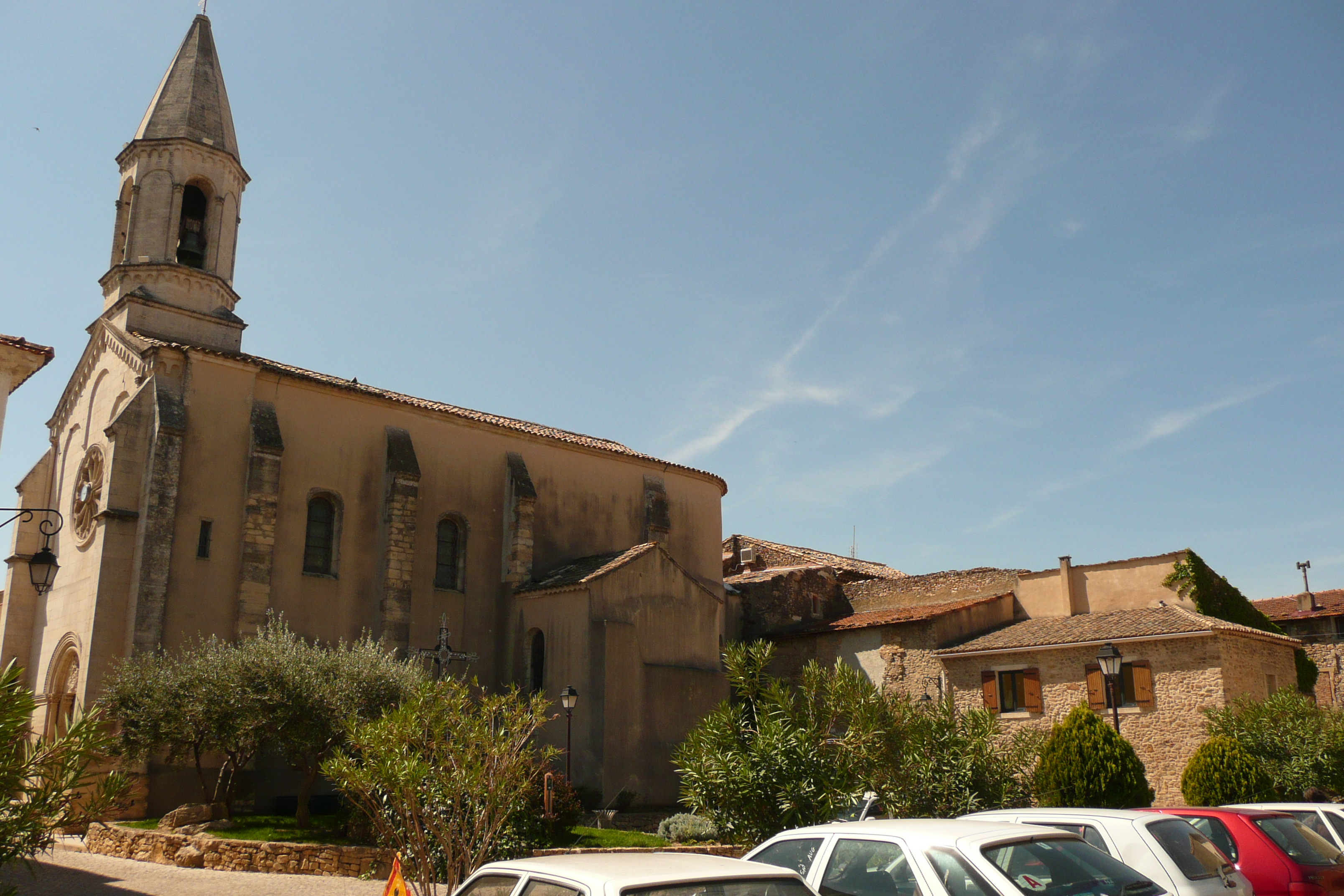 Eglise à Codolet.